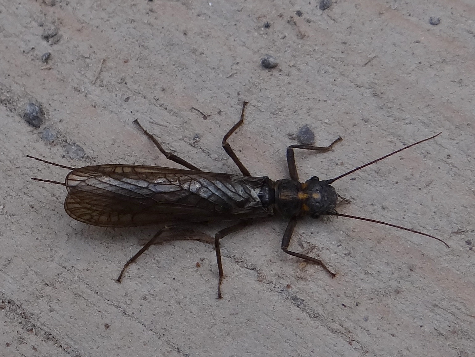 Perla marginata {habitat:Tatra Mountains, Kościeliska Valley)